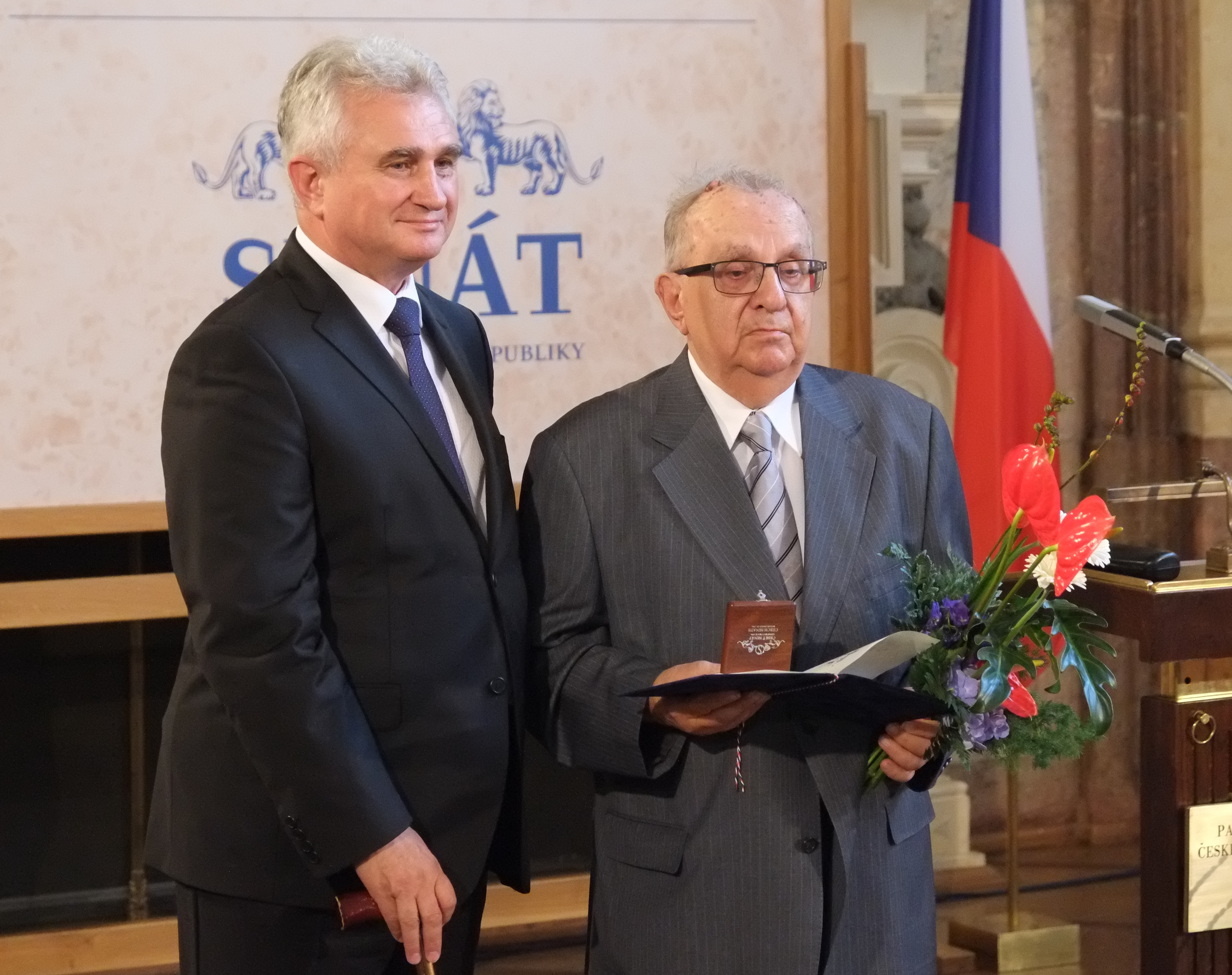 Prof. Jaromír Kolář a předseda Senátu Milan Štěch při slavnostním předávání stříbrných medailí v roce 2016.